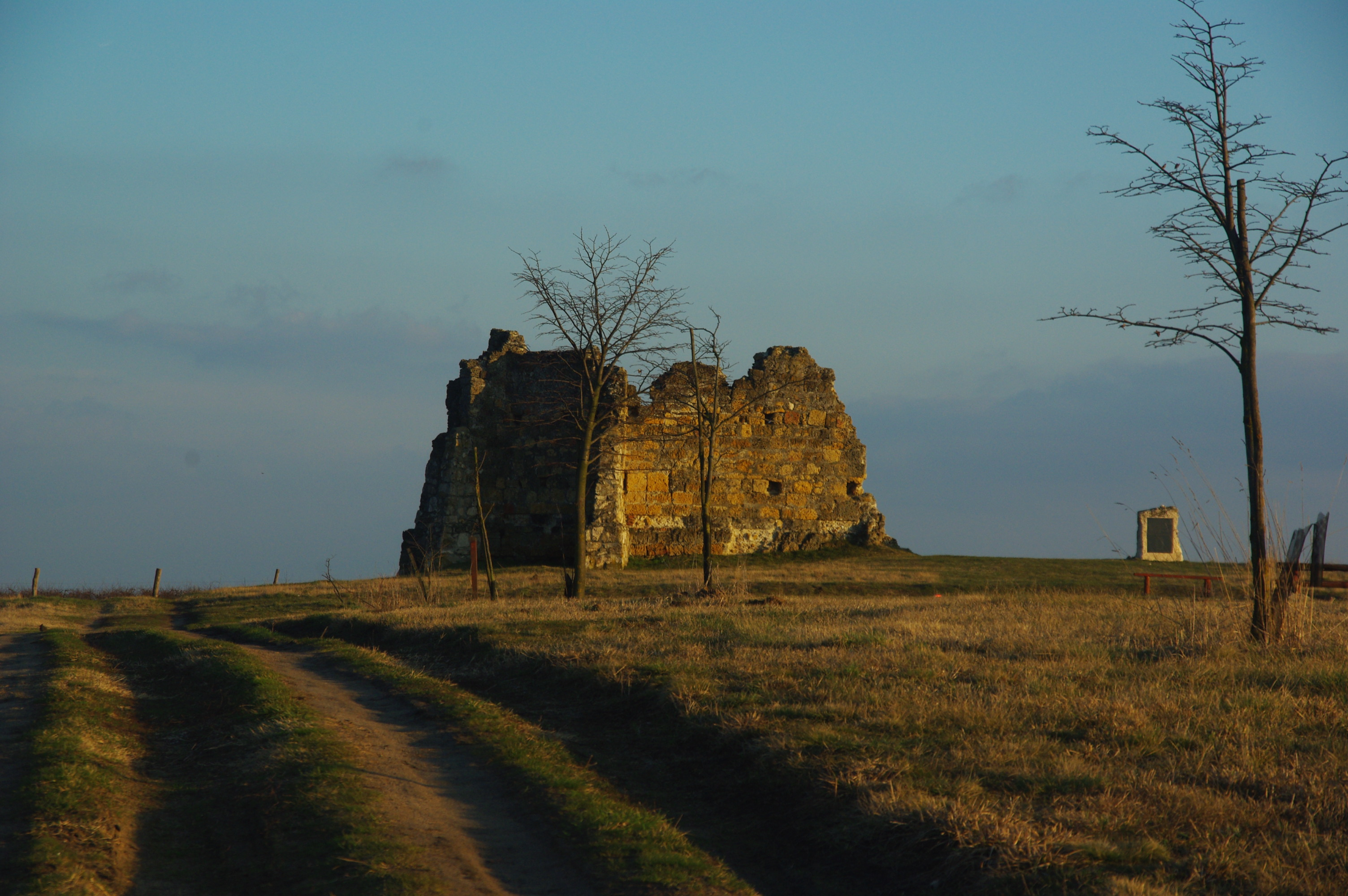 XIV.szdi gót stílusú templom konzervált romja, Bács-Kiskun Megye védettség : Műemléki védelem azonosító : 2326 törzsszám: 667 Bővebben ld.